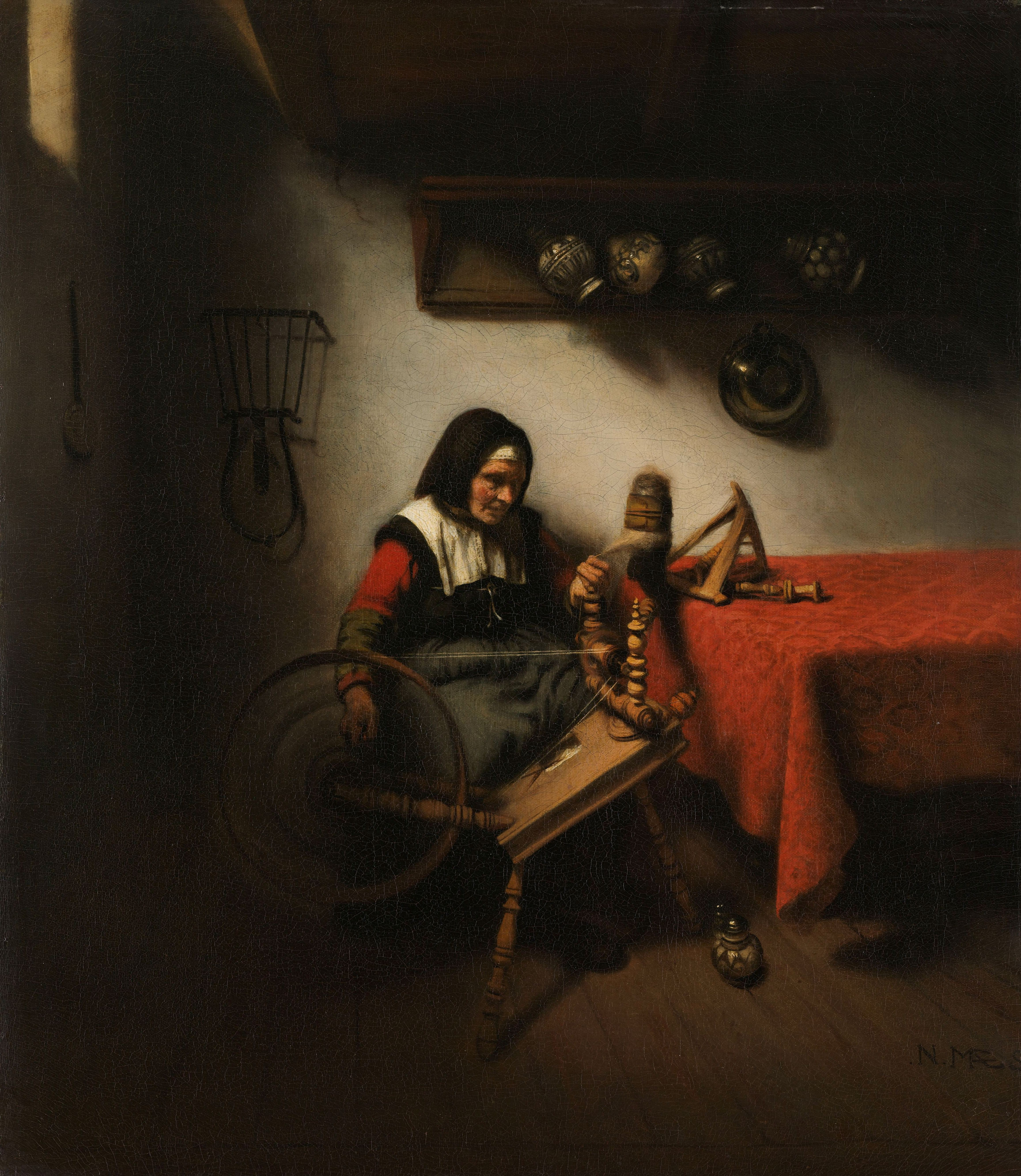 De spinster. Links van een tafel zit een oude vrouw wol te spinnen. Tegen de muur een rek waaraan vier kruiken hangen.